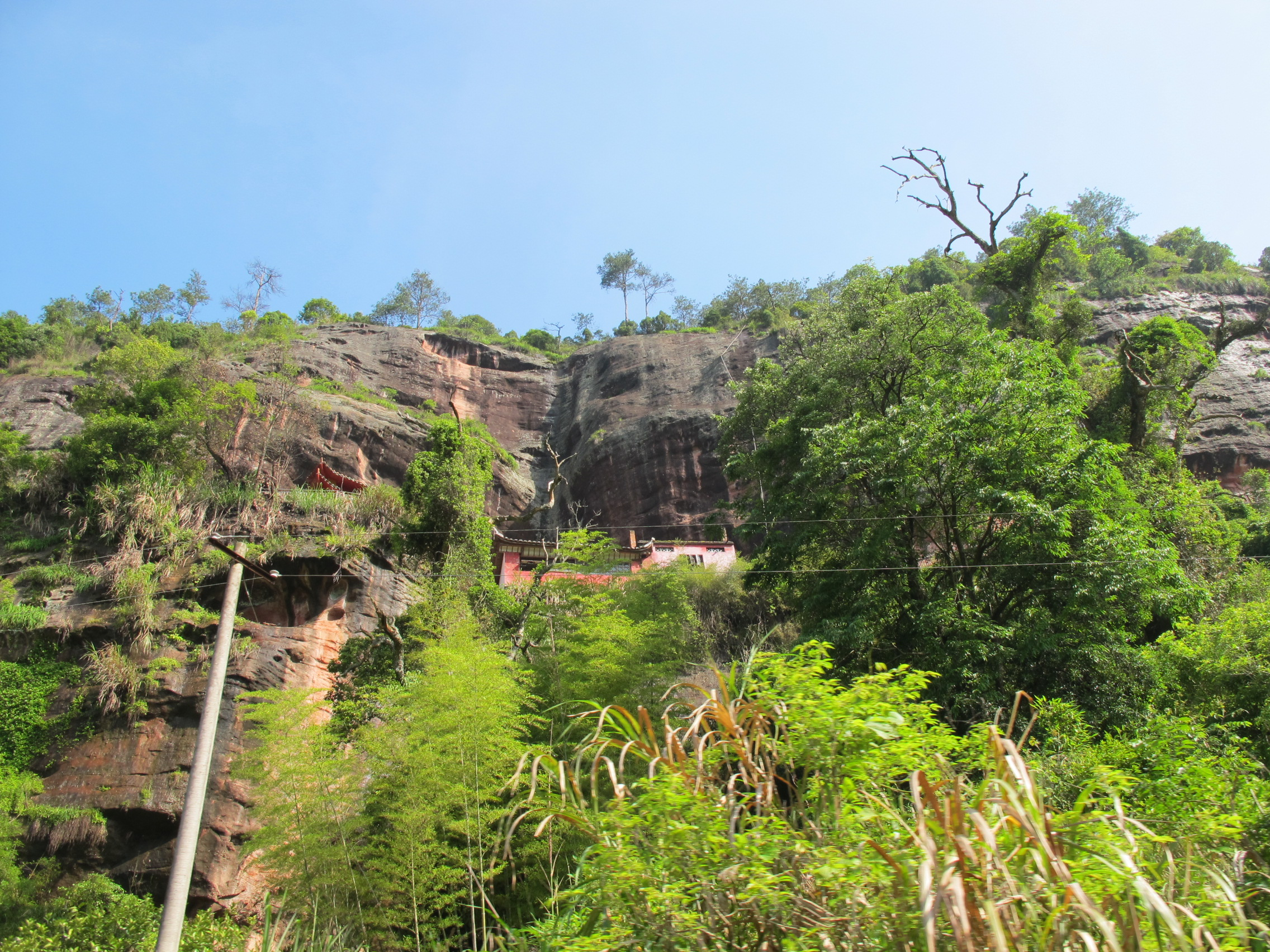 寨色村的悬空寺